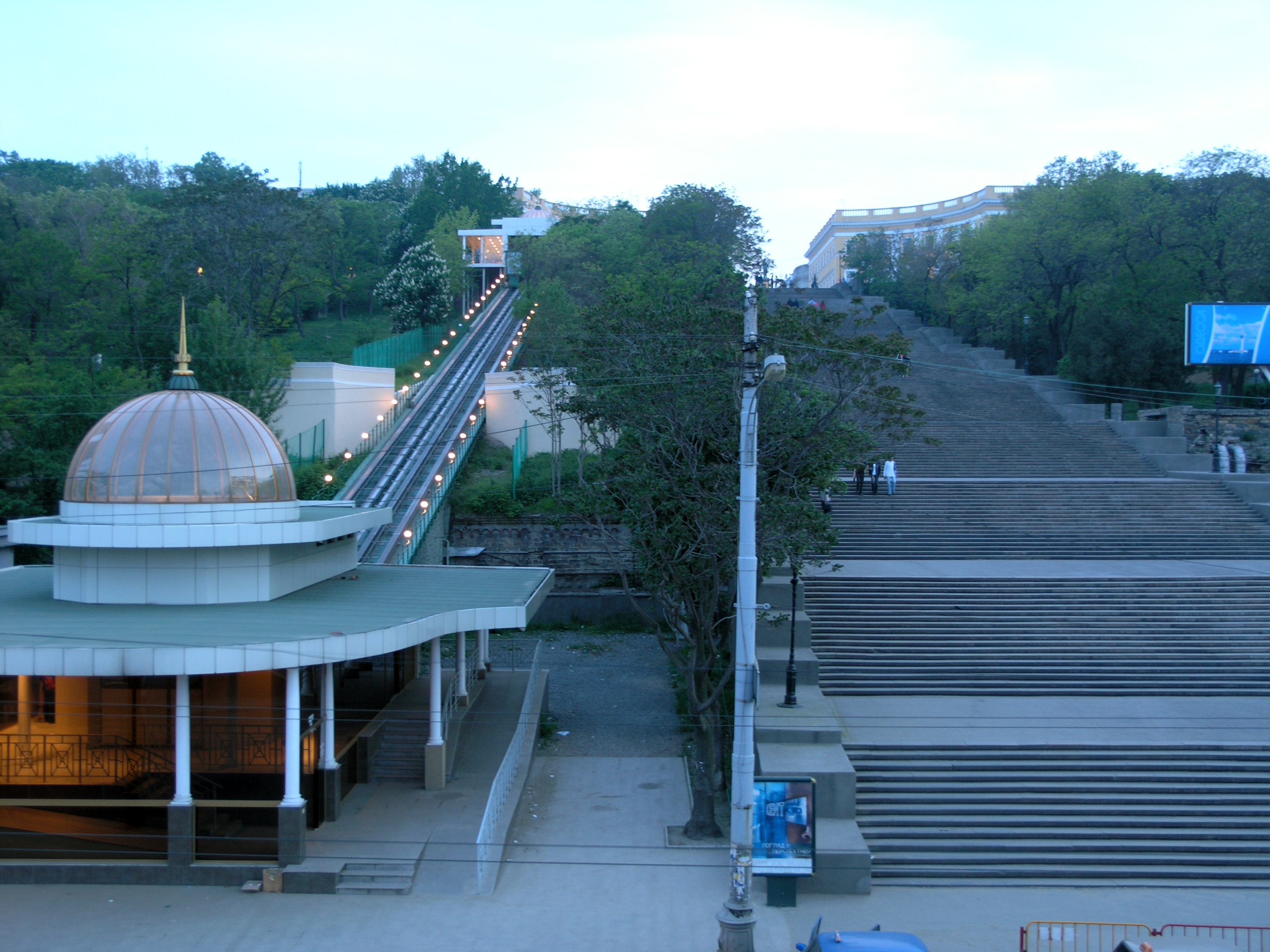 Україна, Одеса - Приморські (Гігантські, буларні, Потьомкінські) сходи